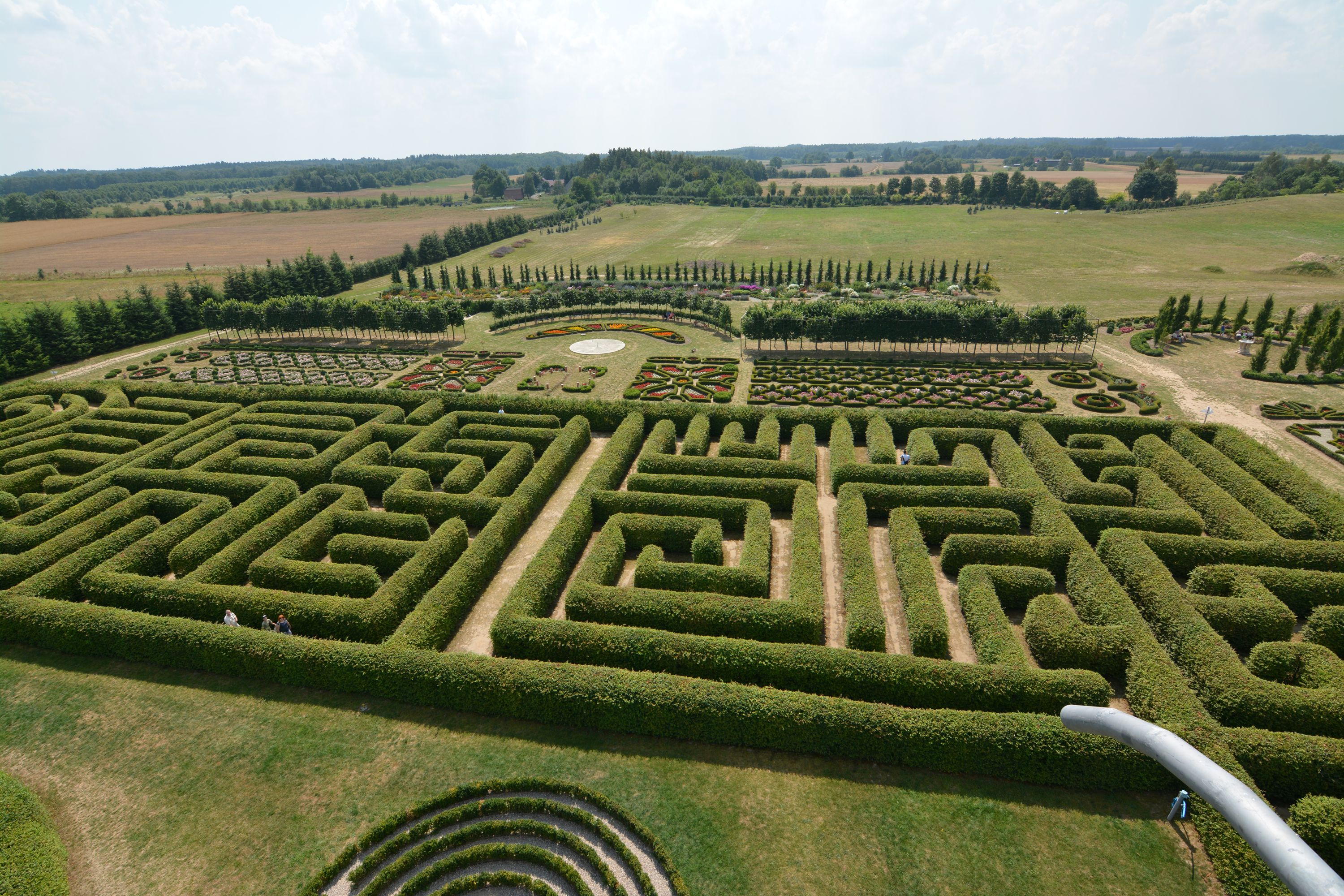 Ogrody Hortulus Spectabilis w Dobrzycy (powiat koszaliński)